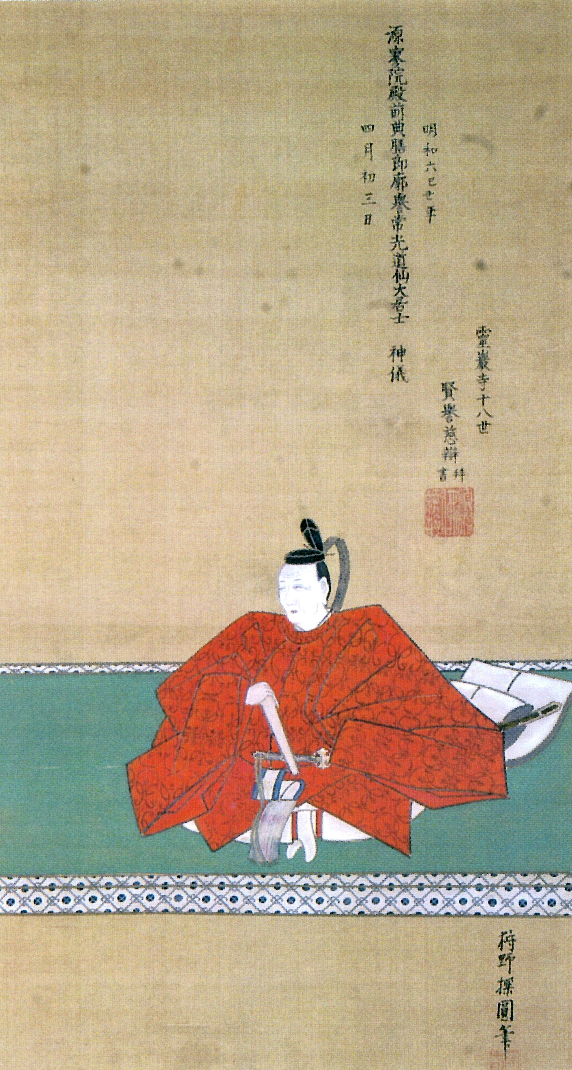 京極高長の肖像。